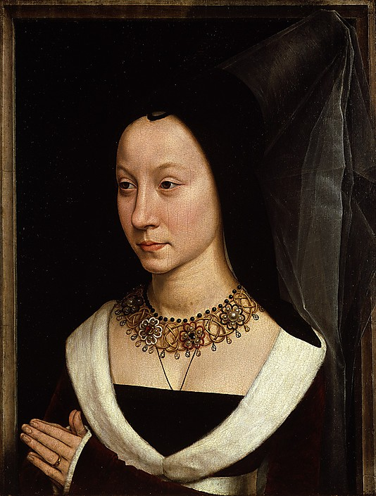 Maria Maddalena Baroncelli, born 1456.